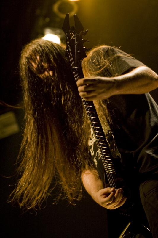 Cannibal Corpse Pat O'Brien of Cannibal Corpse Live @ Santana Hall - 21/02/2010 - São Paulo, Brasil É proibida a cópia ou reprodução deste material sem a autorização do autor. Por favor, não publique nada daqui sem o devido crédito. Fotógrafo: Alexandre Cardoso